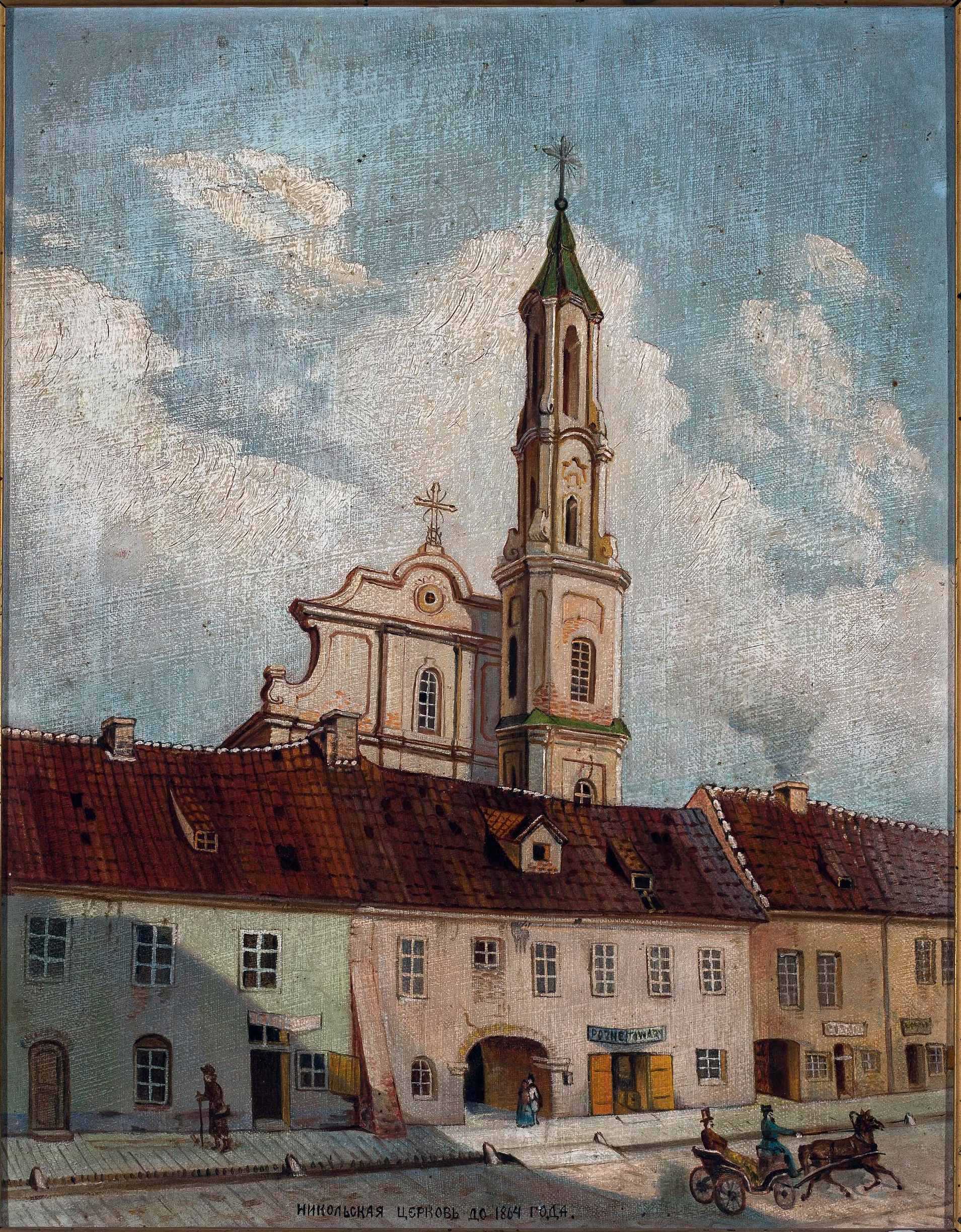 Беларуская (тарашкевіца): Вільня (Vilnia), вуліца Вялікая (vulica Vialikaja). Царква Сьвятога Мікалая